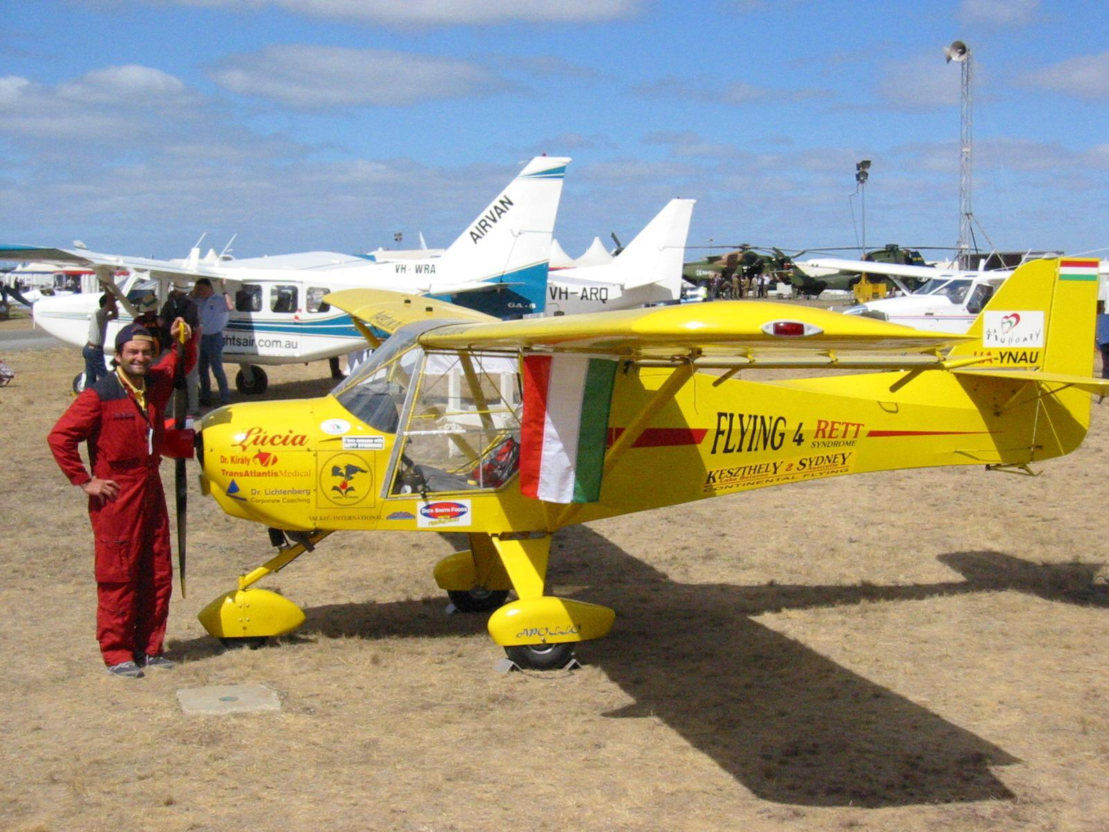 Lucia Avalon Airshow (Melbourne, Australia) 2013. februar